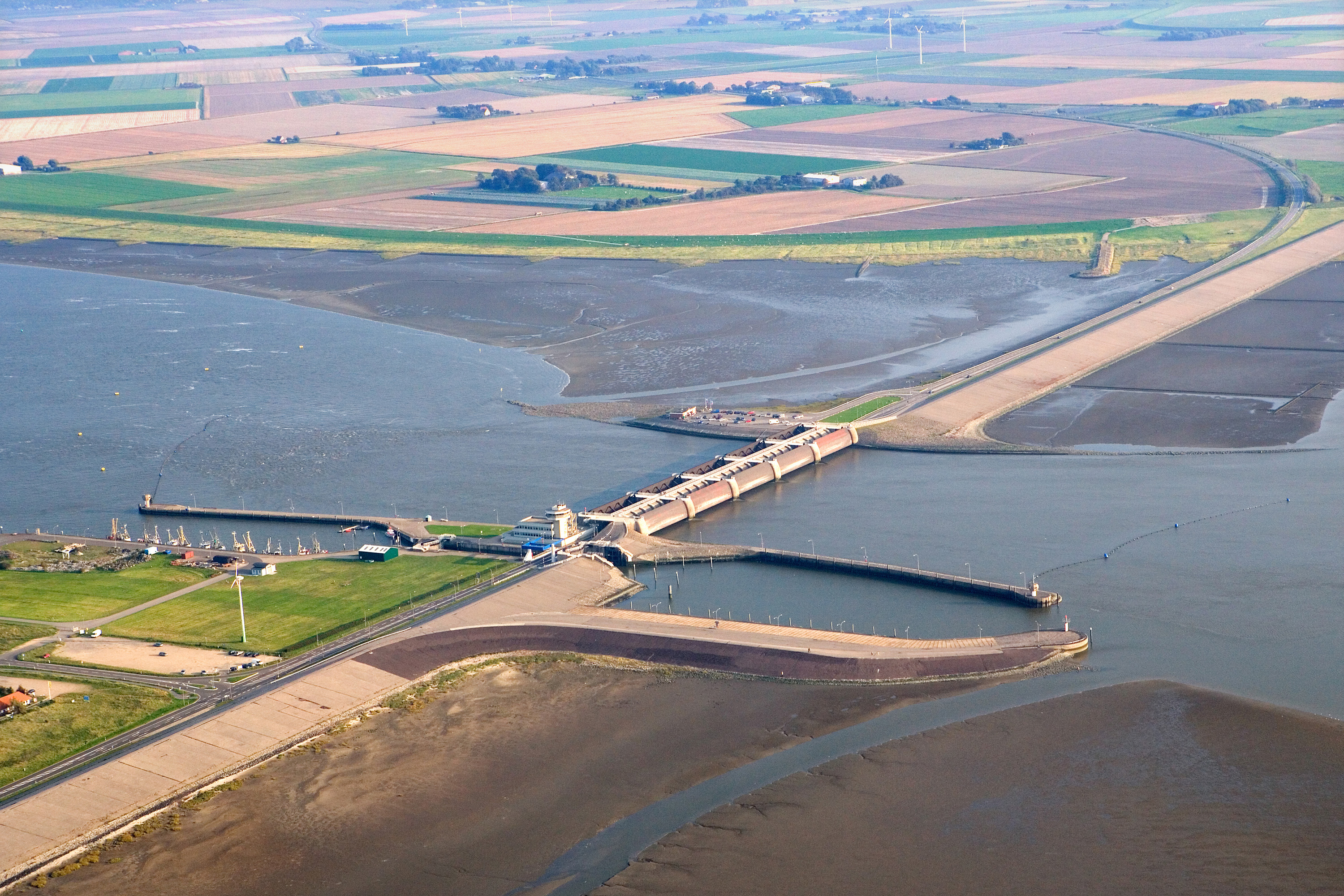 Luftaufnahme des Eidersperrwerks von der Wasserseite